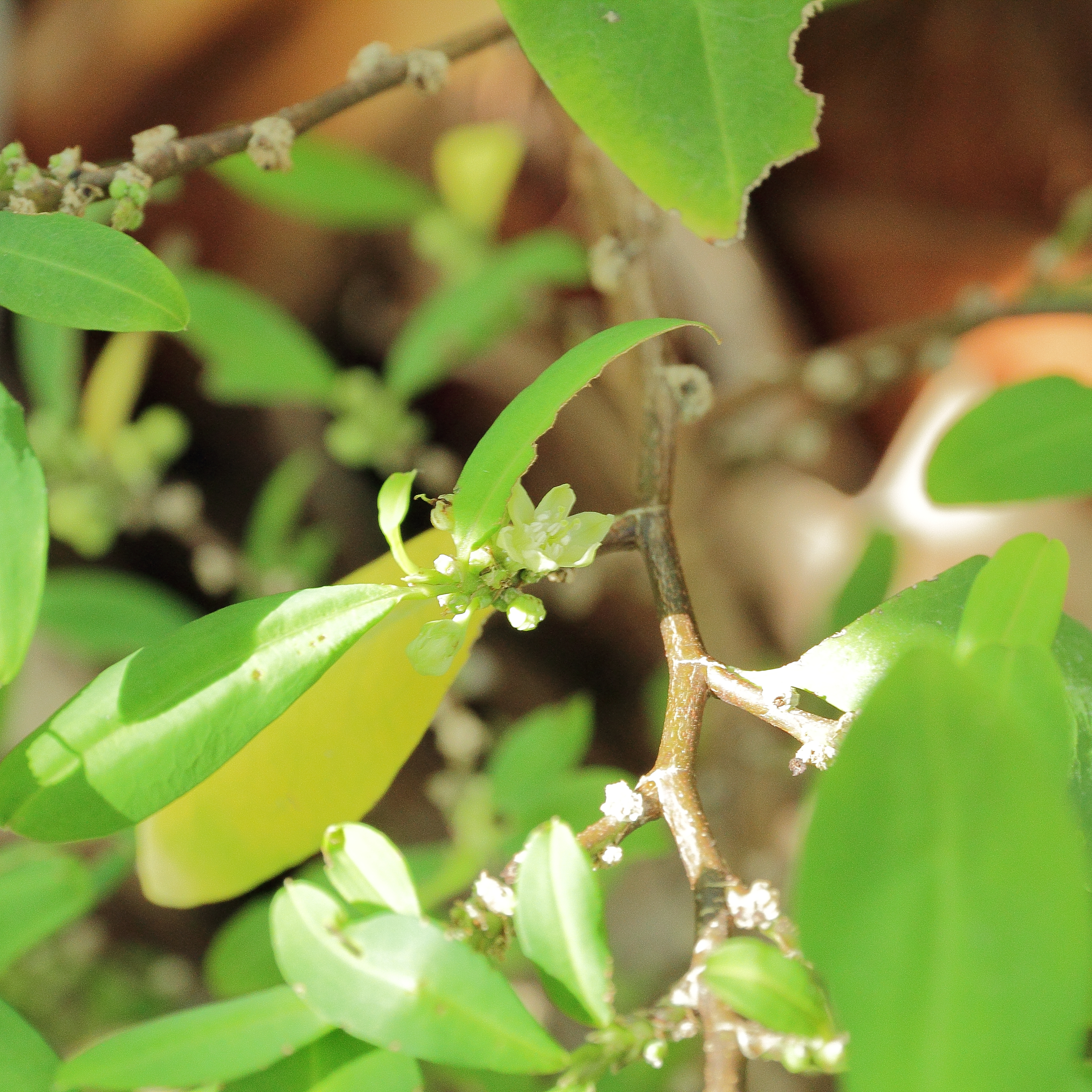 Erythroxylum novogranatense i Bergianska trädgården.